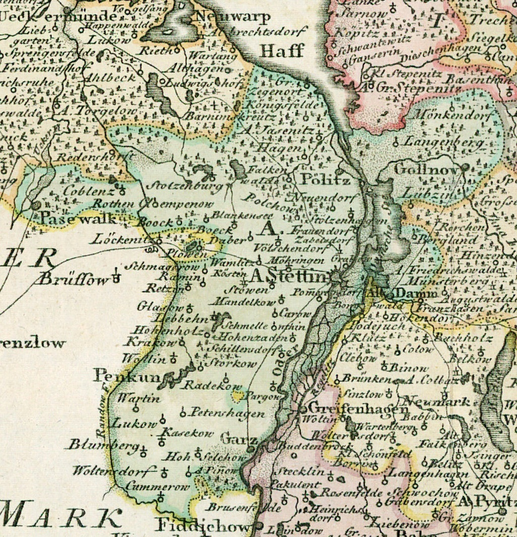 Ausschnitt aus "Landkarte des Herzogtums Vor- und Hinterpommern aus dem Jahr 1794"